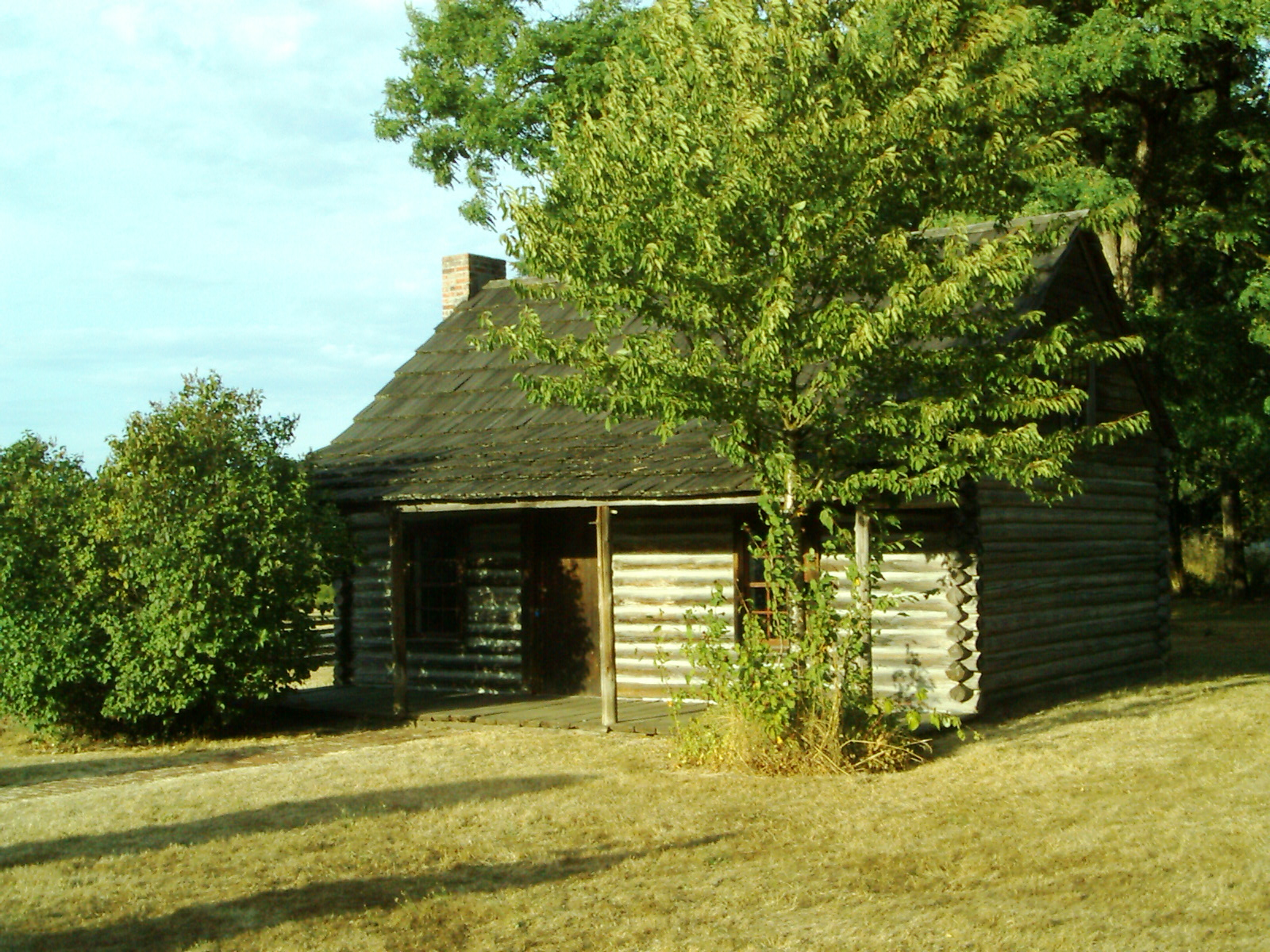 Jackson Court House Sonstiges: ...